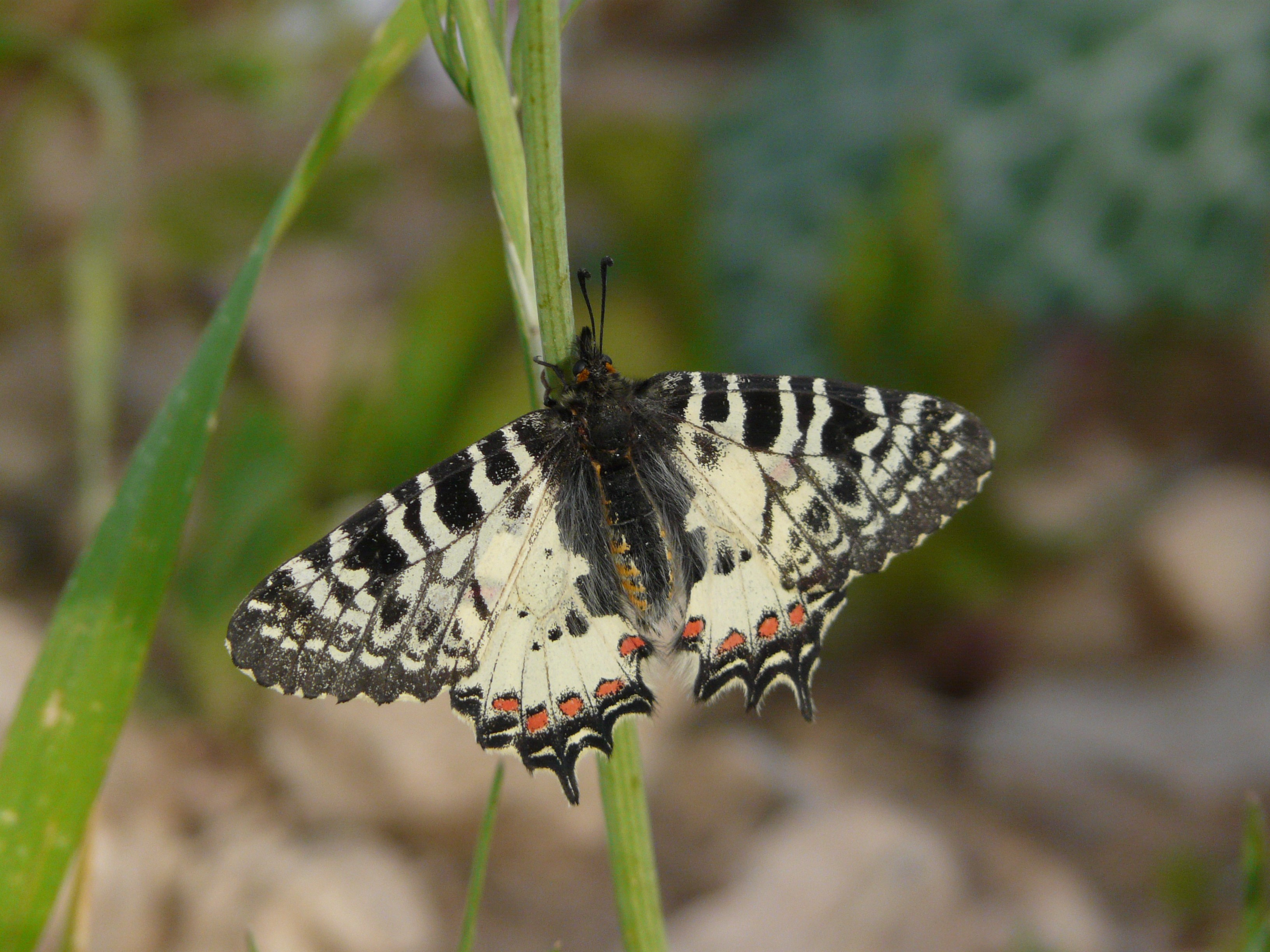 Allancastria deyrollei, Eastern Steppe Festoon, Jordan